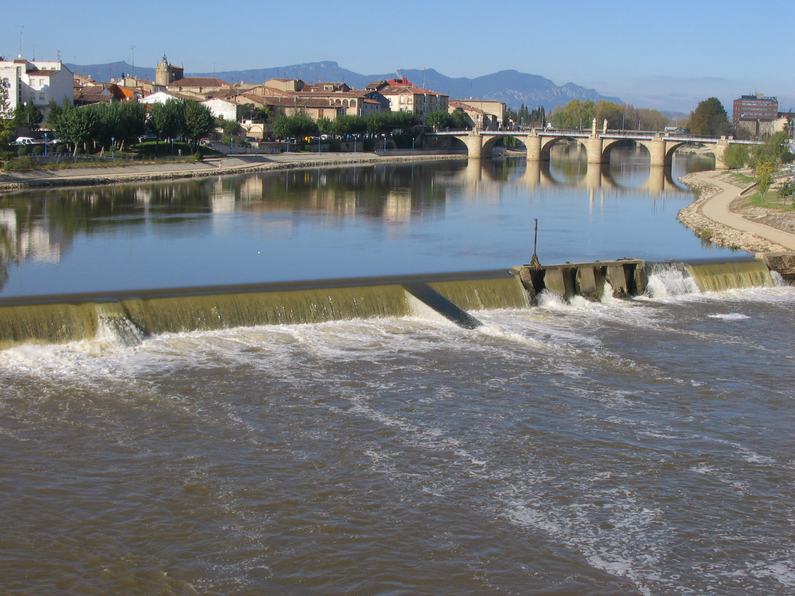 Vista general desde el Puente Nuevo, del rio Ebro. La ribera de la izquierda es la que corresponde a "Aquende" y la de la derecha es la correspondiente a "Allende"